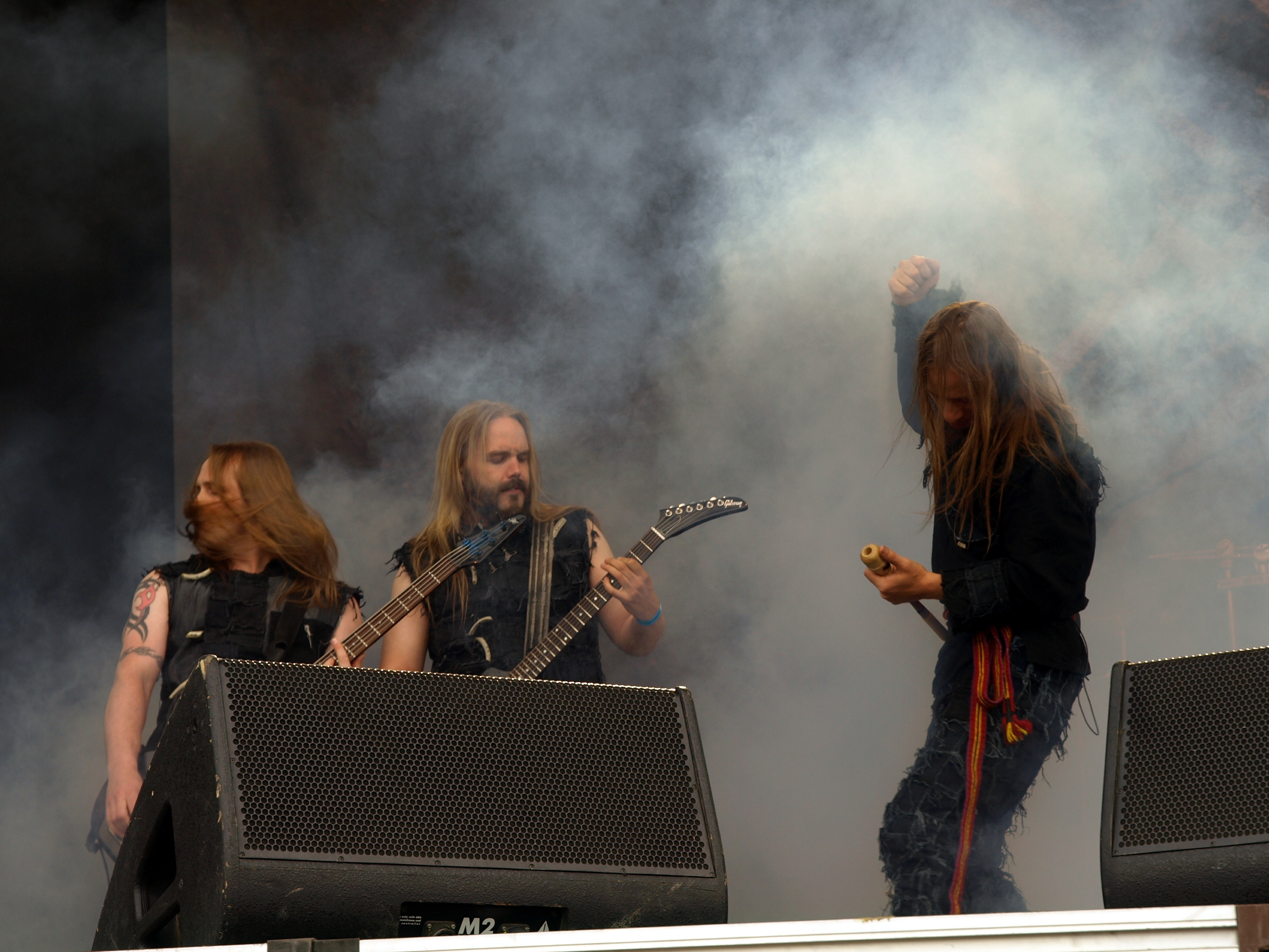 Metsatöll live am Myötätuulirock 2011